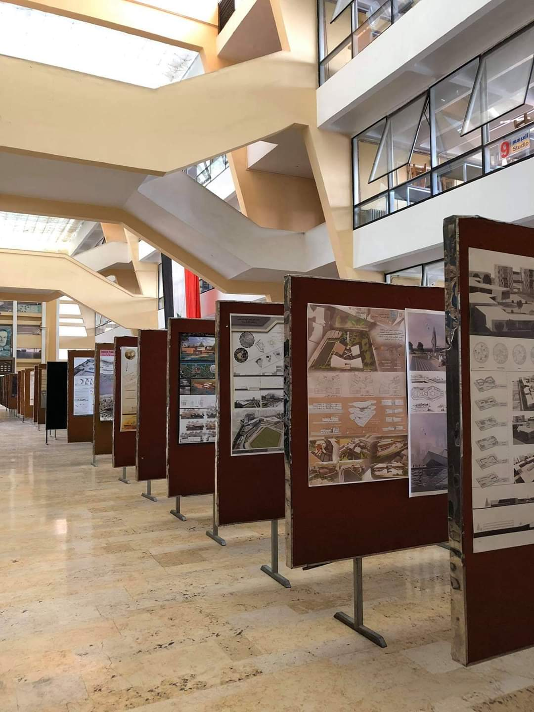 معرض في كلية الهندسة المعمارية بجامعة دمشق